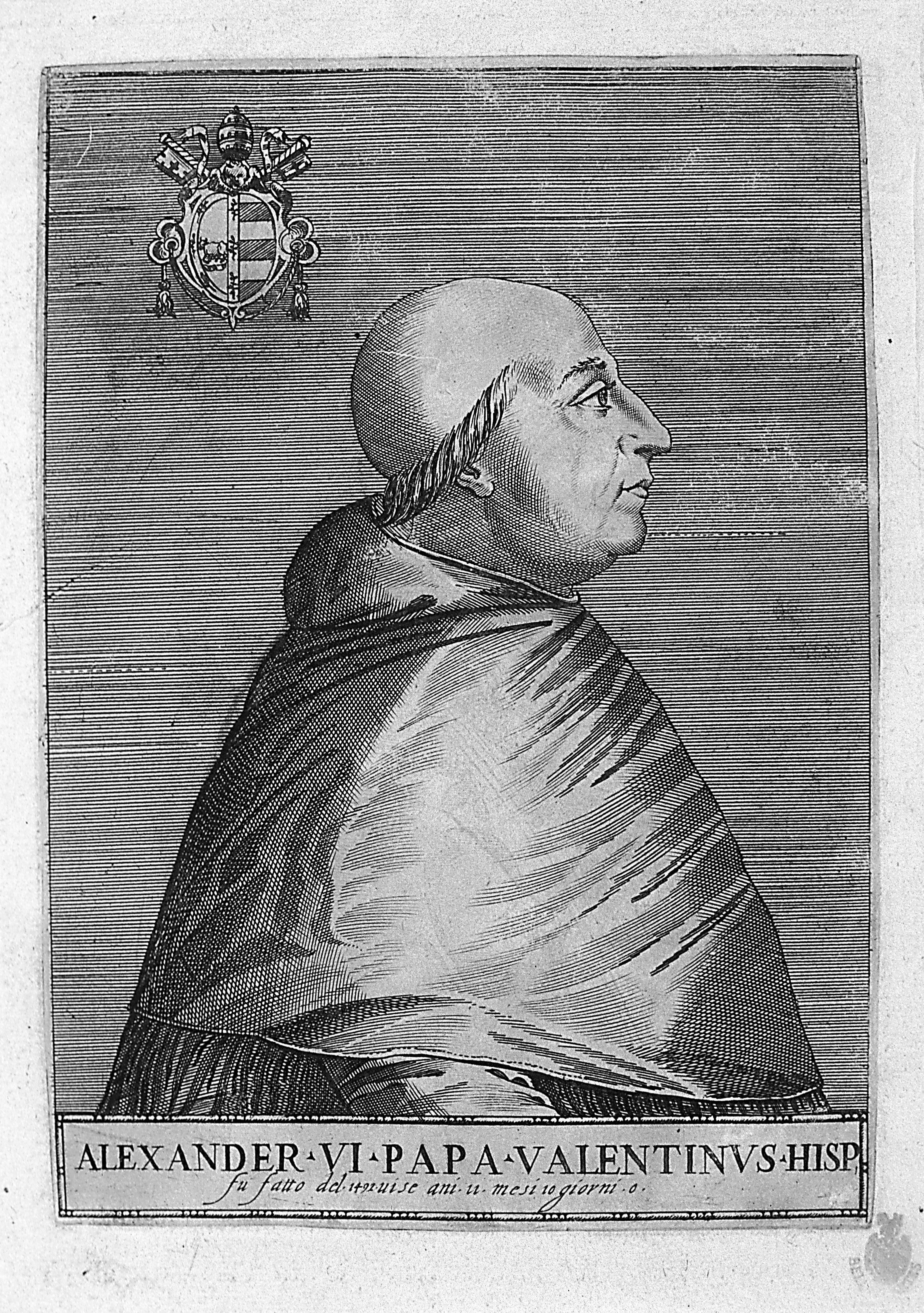 Alejandro VI (* Játiva, Valencia, 1 de enero de 1432 – † Roma, 18 de agosto de 1503) fue Papa nº 214 de la Iglesia Católica